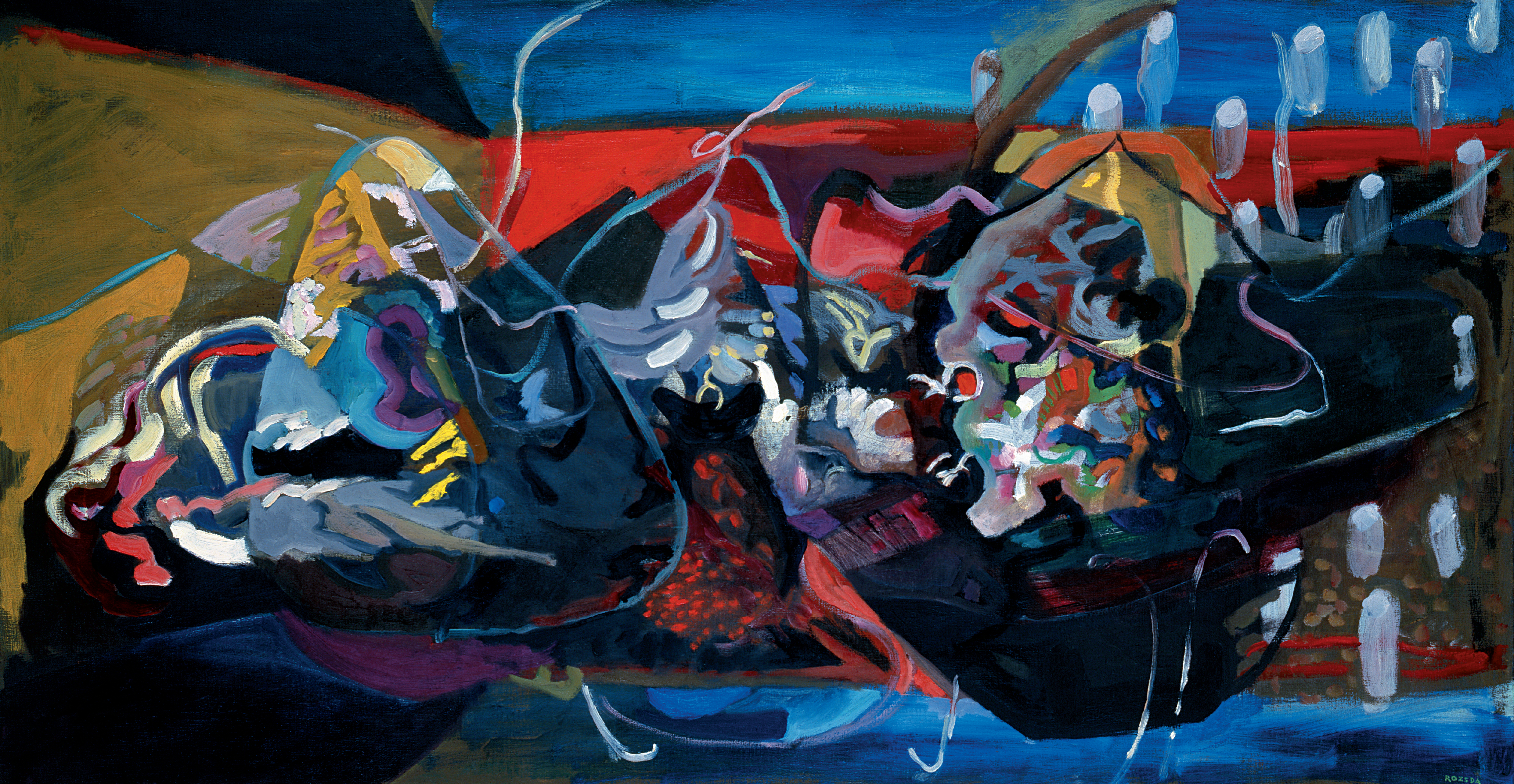 Szürrealista festmény